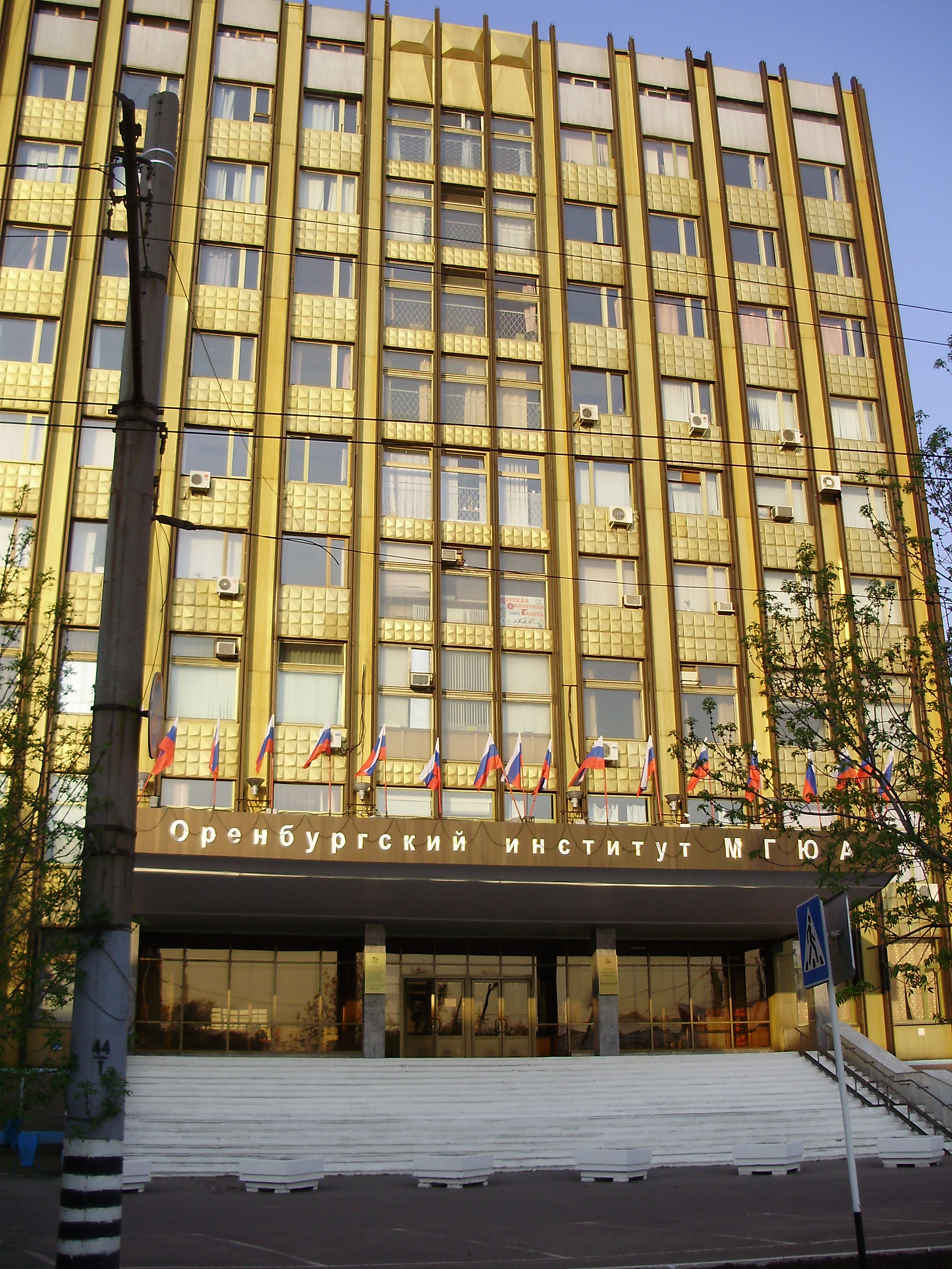 Sur cette petite photo Vous pouvez voir un établissement d'enseignement supérieur l'Institut d'Orenbourg de l'Acadèmie de droit de Moscou O.I.Koutafine.